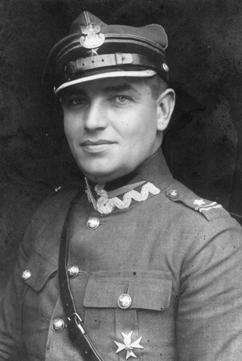 Alojzy Tadeusz Schuster (w stopniu majora, rok 1924)